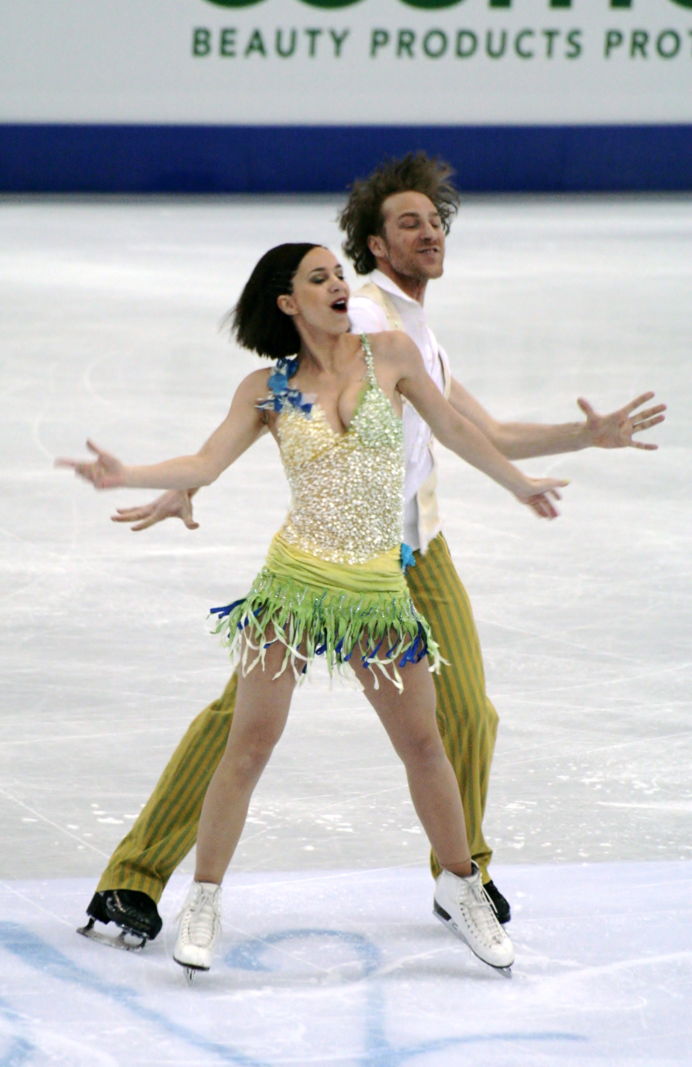 Натали Пешала и Фабьен Бурза (Франция) на чемпионате мира по фигурному катанию 2012